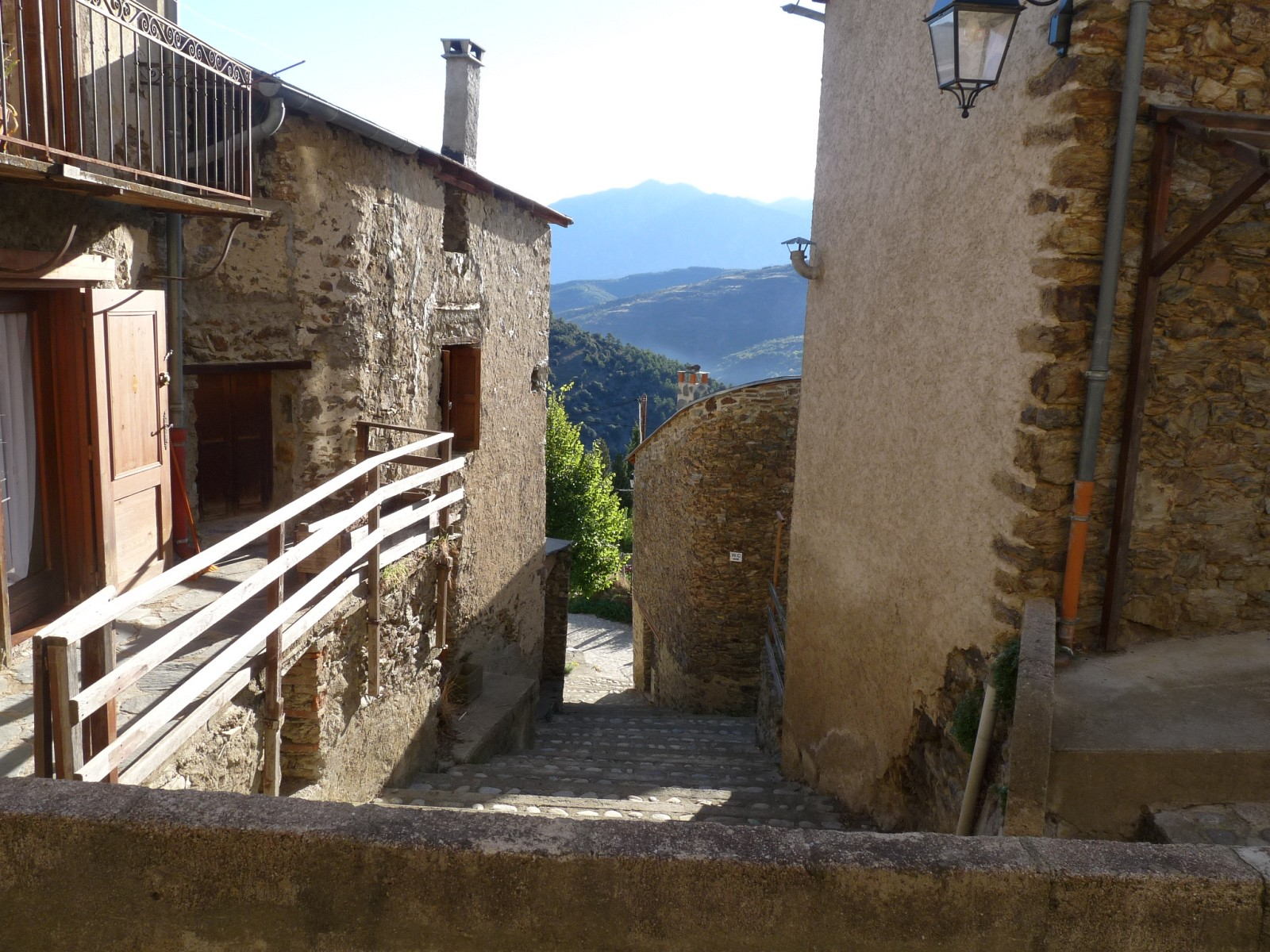 Vue du village d'Oreilla, Pyrénées-Orientales, France